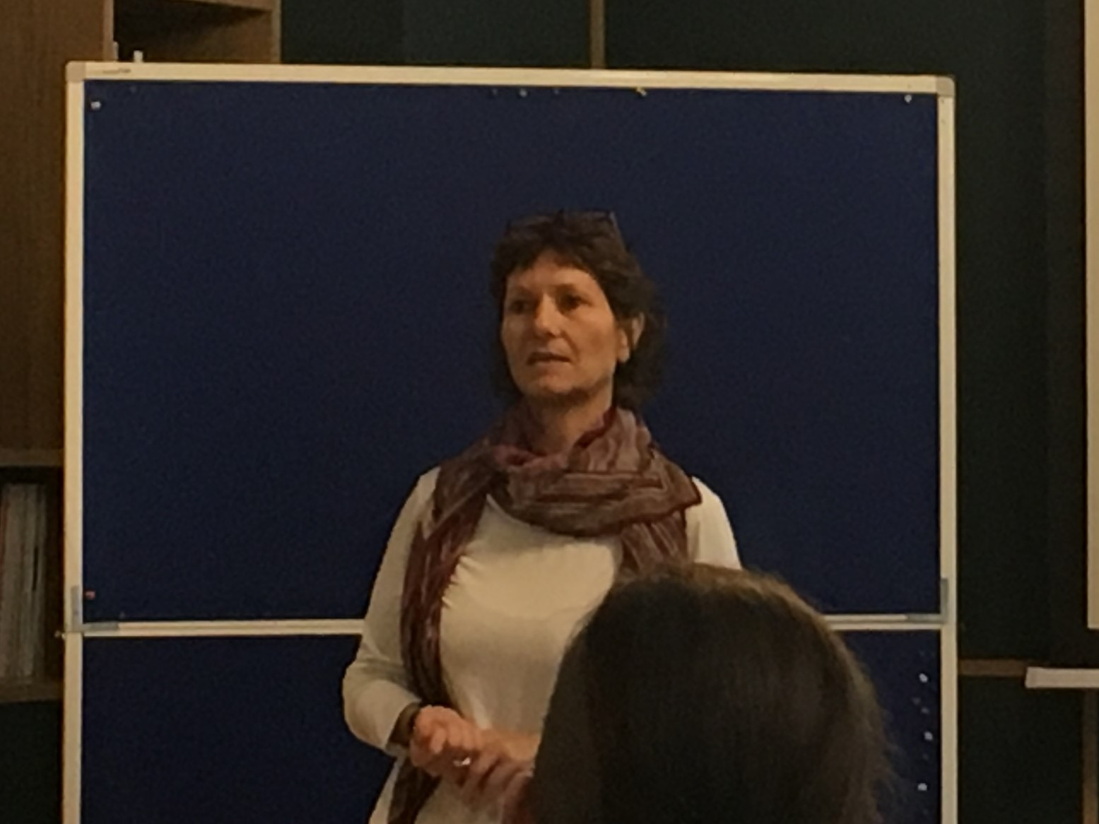 Jutta Eckstein, deutsche Informatikerin auf einem Vortrag von GEWINN # Gender.Wissen.Informatik.Netzwerk // in Berlin